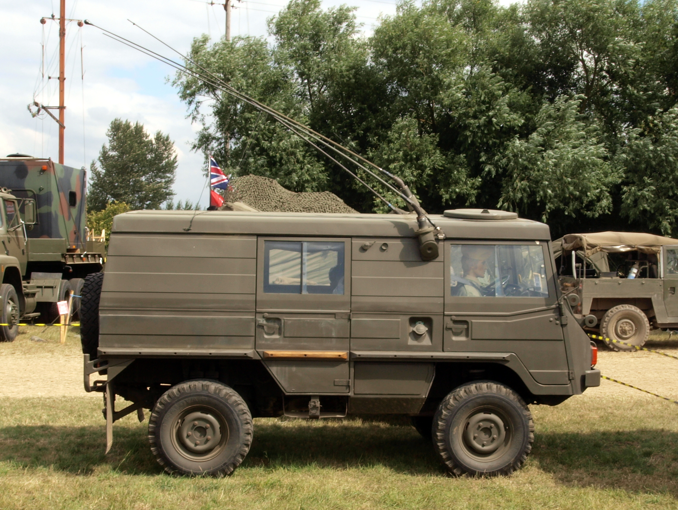 Steyr Puch Pinzgauer